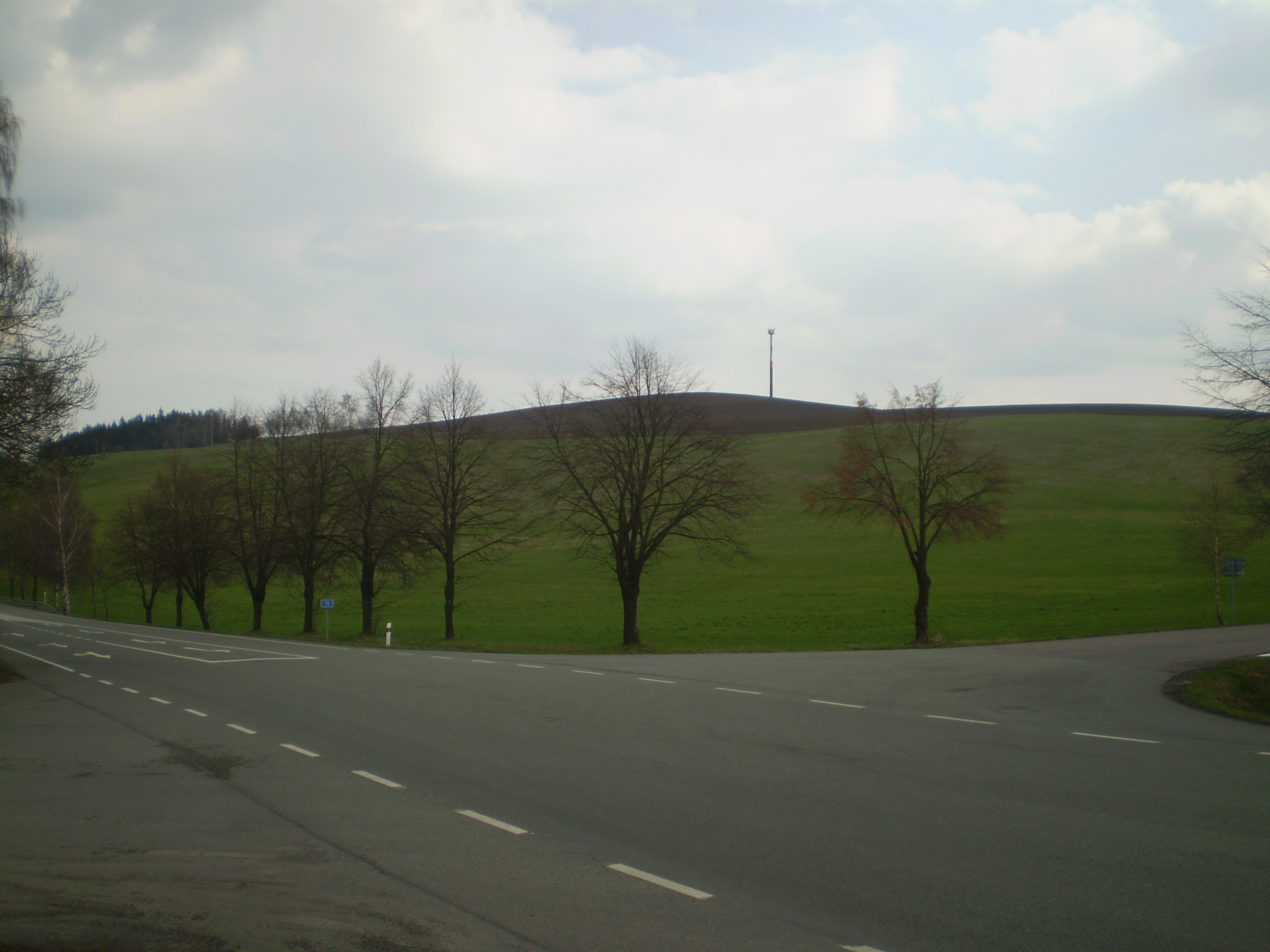 Vedralovice, Podorlická pahorkatina